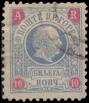 Первая марка Черногории для уведомления о вручении